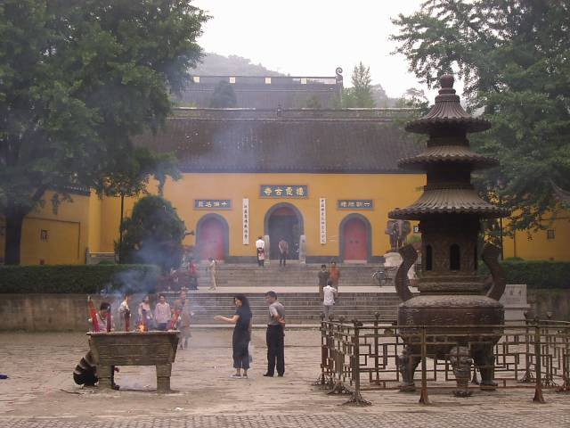 栖霞寺 2004年5月29日撮影 撮影者:権作 参照：